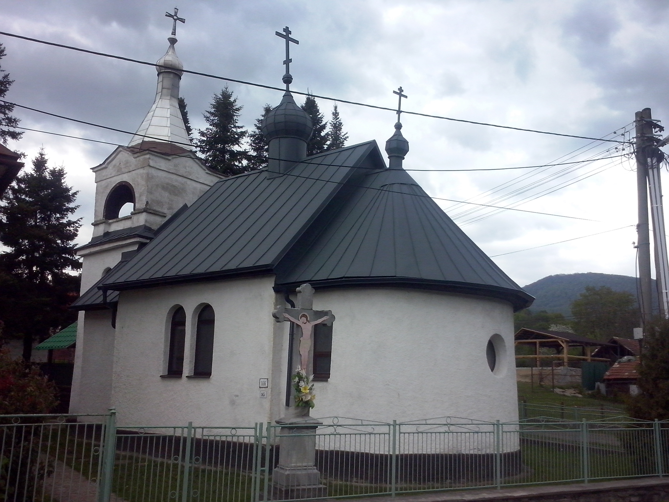 Uličské Krivé (Słowacja) - cerkiew prawosławna Narodzenia Przenajświętszej Bogurodzicy